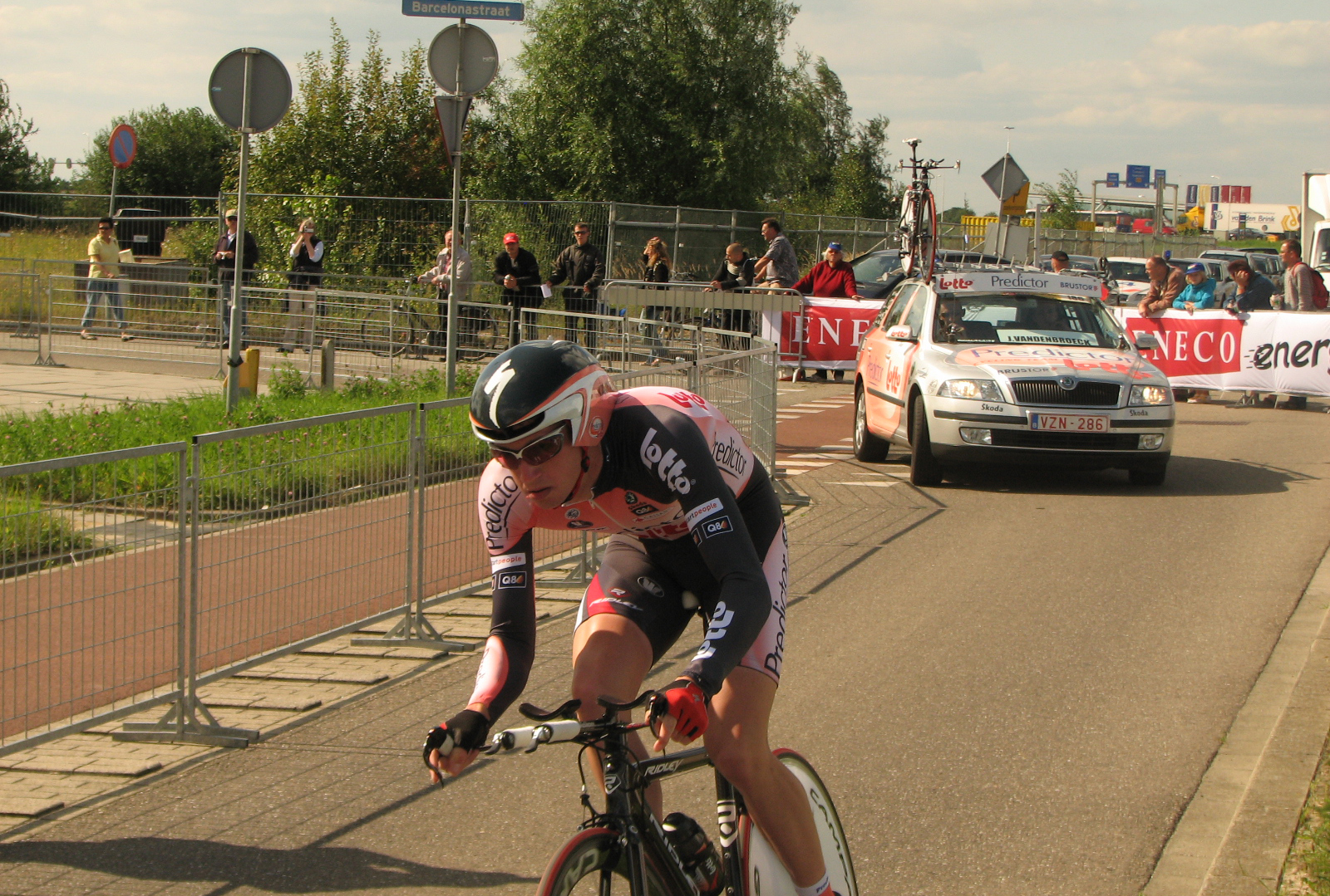 Jurgen Van den Broeck, Eneco Tour 2007 Time Trial